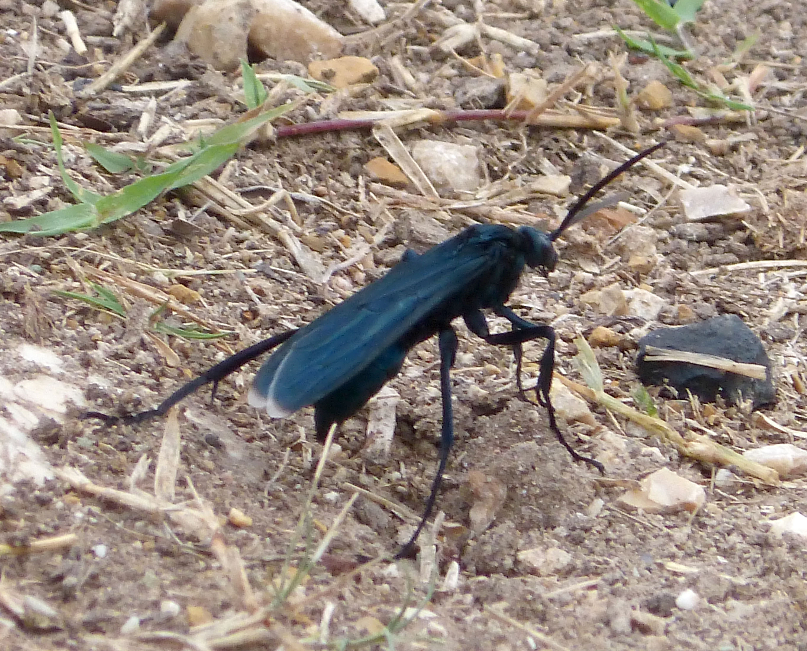 La Belen. Sierra de Najasa, Cuba